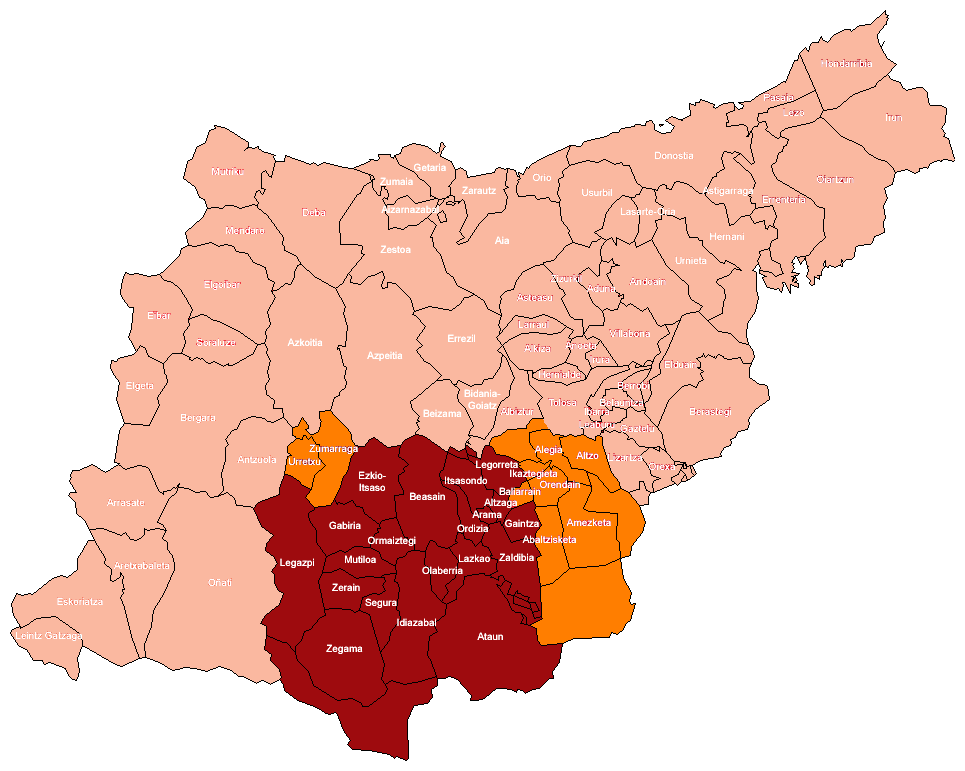 Goierriko gipuzkera zein udalerrietan mintzatzen den (gorri ilunez) adierazten duen hizkuntza mapa. / Linguistic map showing (in dark red) the municipalities where the Goierri sub-dialect of the Basque language is spoken. The villages where the Goierri sub-dialect is spoken mixed Beterri sub-dialect (in light red) and Urolaldea sub-dialect (in light red).